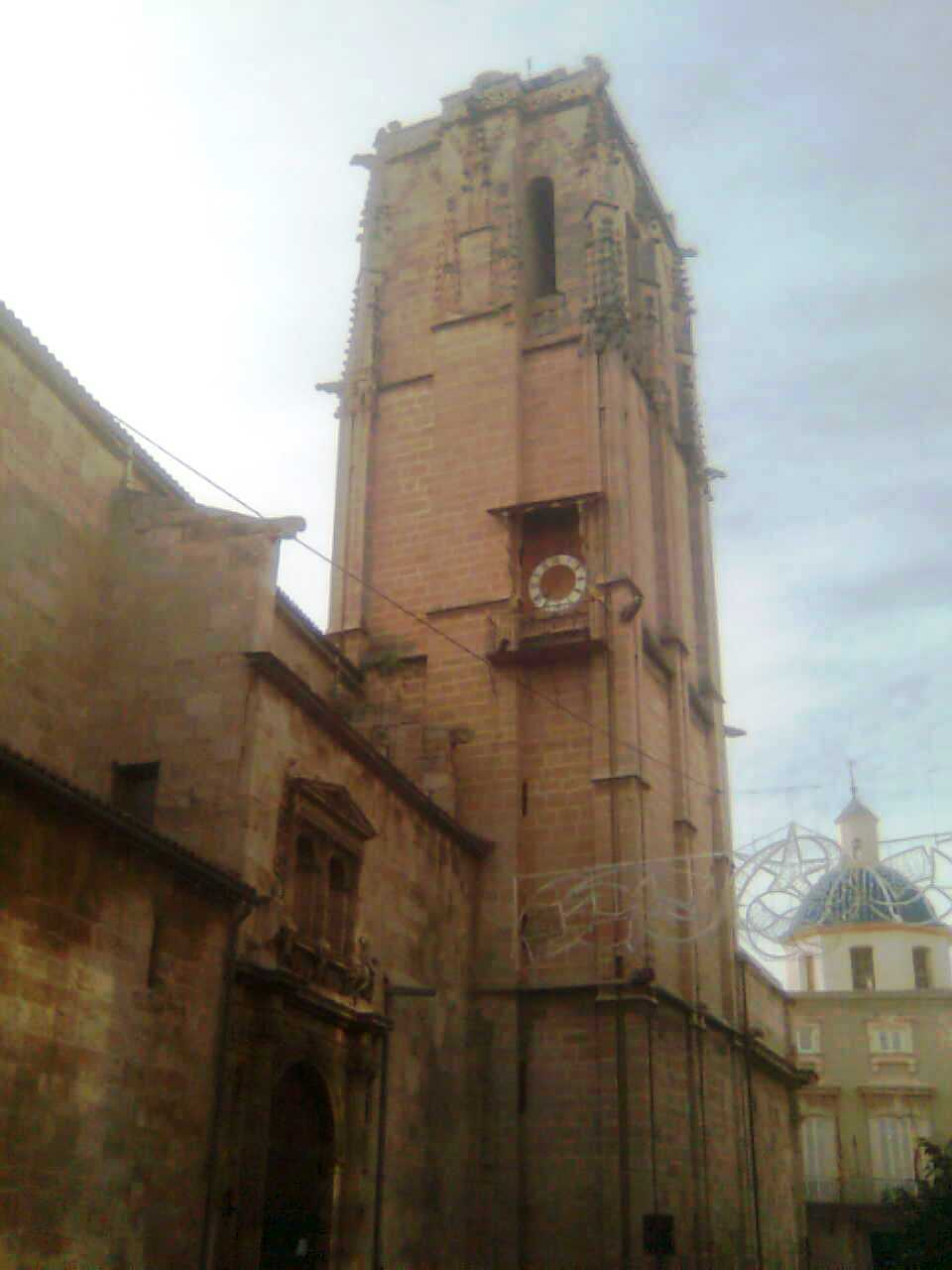 Torre por la zona del reloj de la Iglesia de las santas Justa y Rufina, Orihuela, España